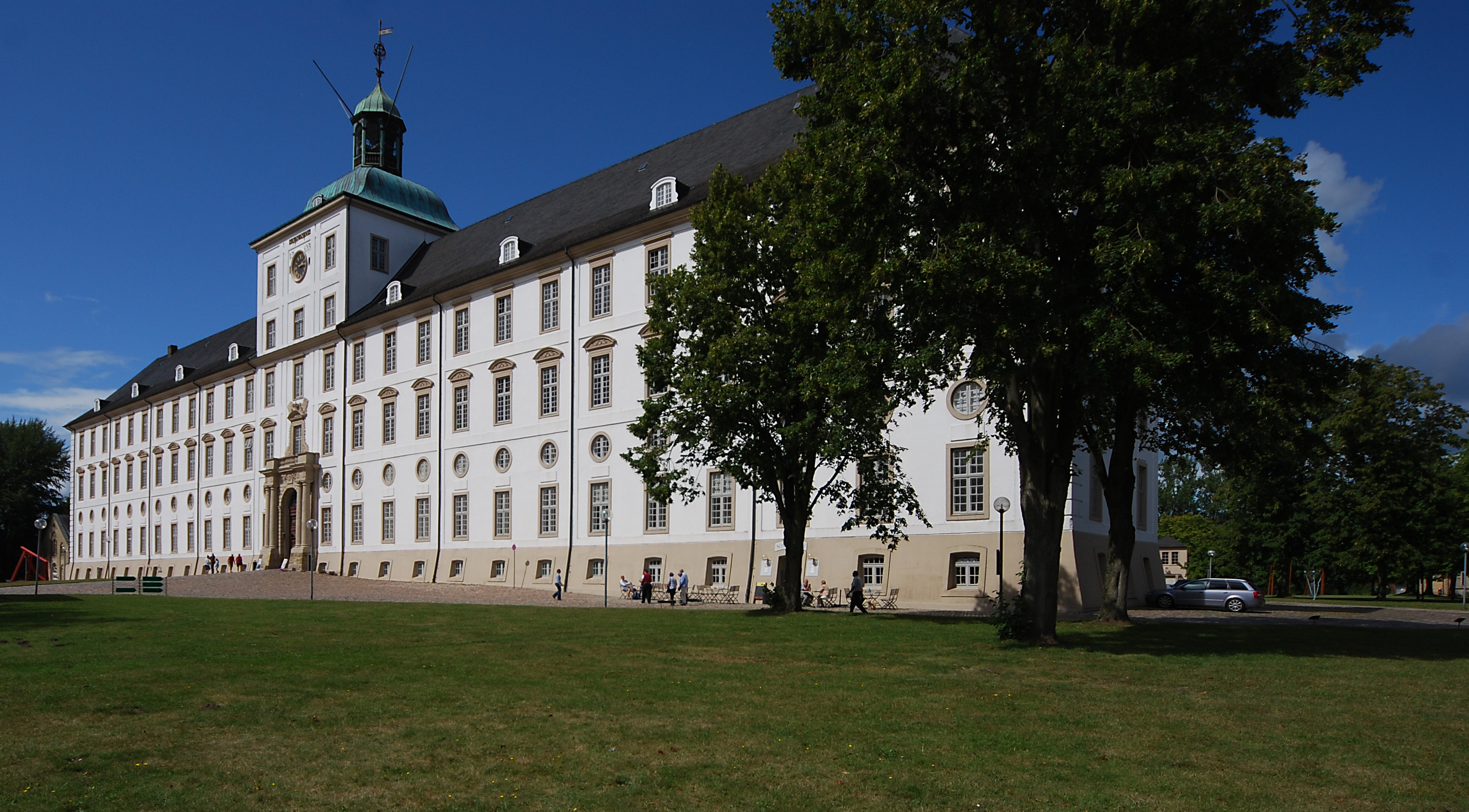 Schloss Gottorf in der Stadt Schleswig im Kreis Schleswig-Flensburg in Schleswig-Holstein